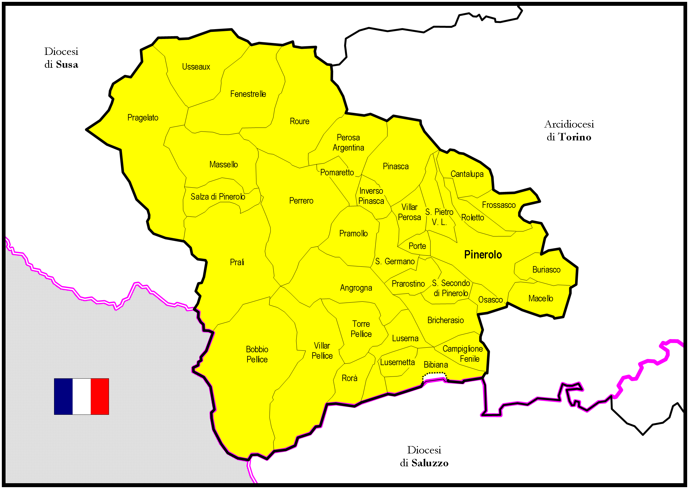 Mappa della Diocesi di Pinerolo (Italia)